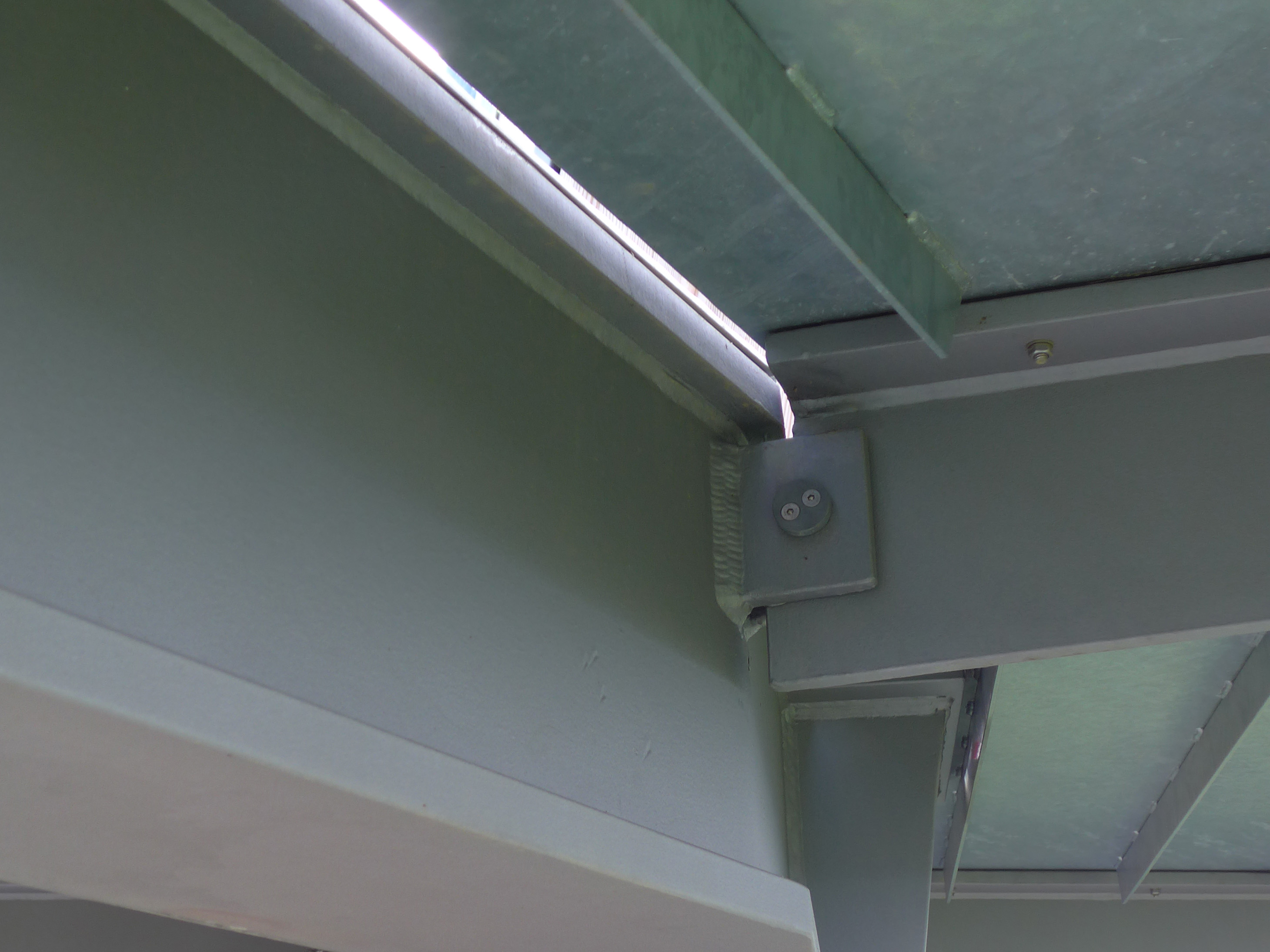 Schönbuchturm, oberste Plattform von unten, Gelenk für Anschluss Radialträger an Ringträger